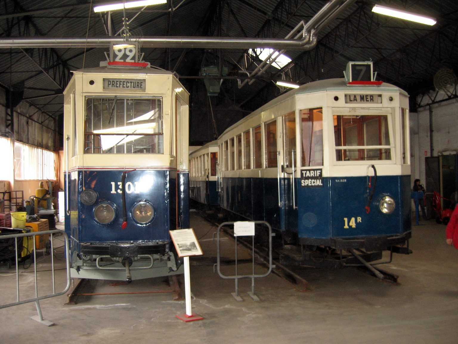 Tramway de Marseille historique à l'AMTUIR 15/09/2007.